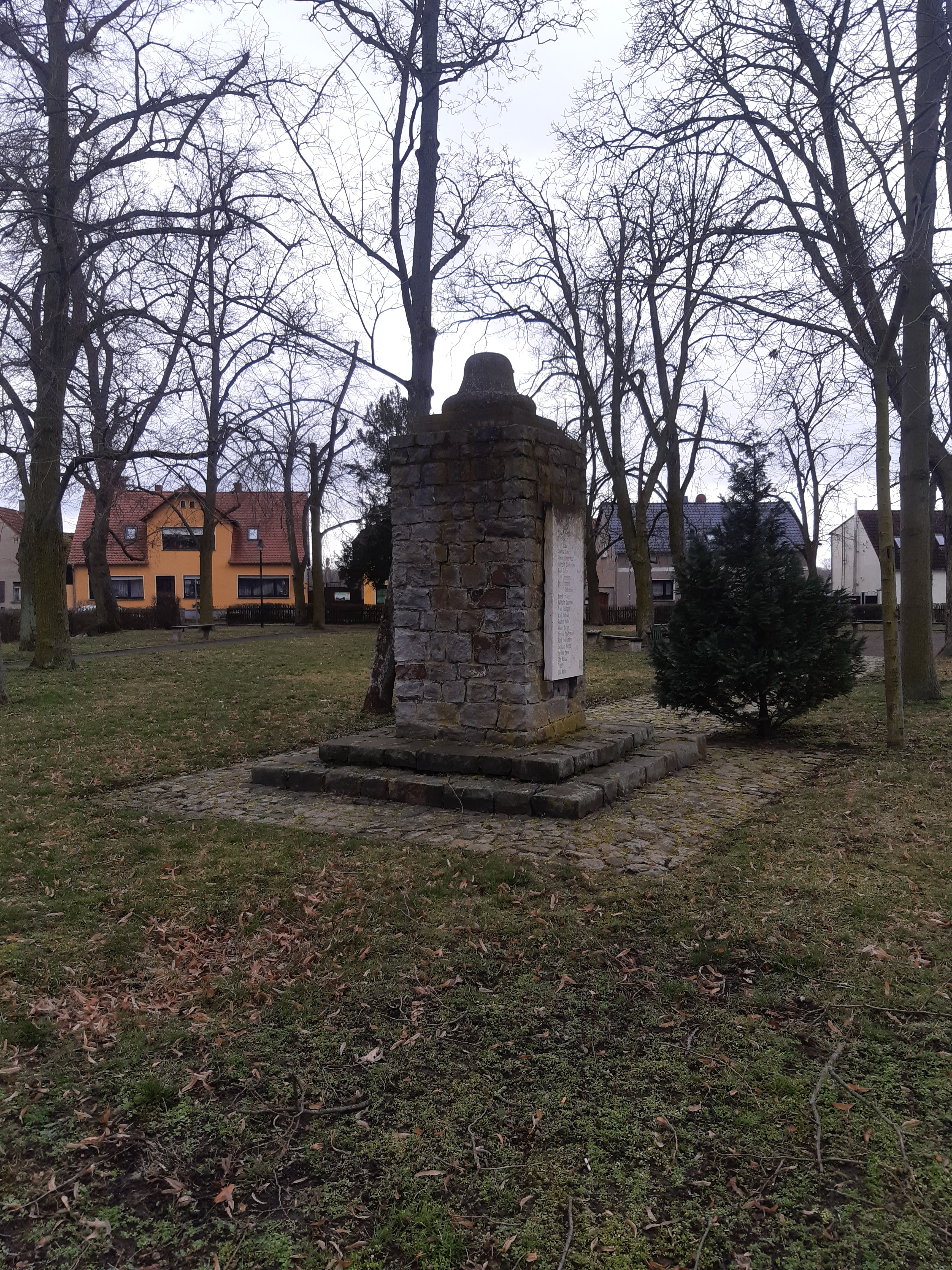 Kriegerdenkmal